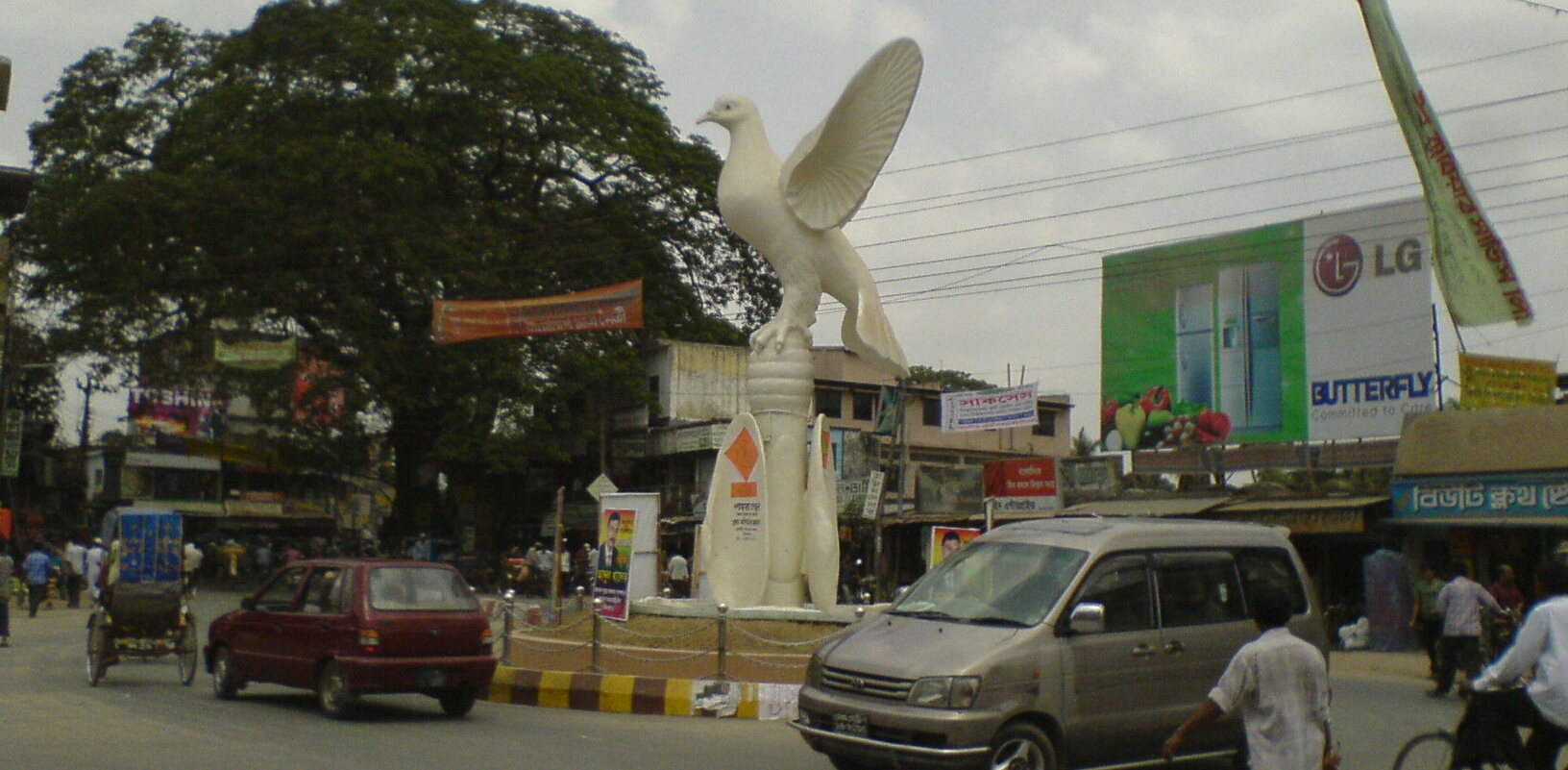 payra chattar, jhenaidah